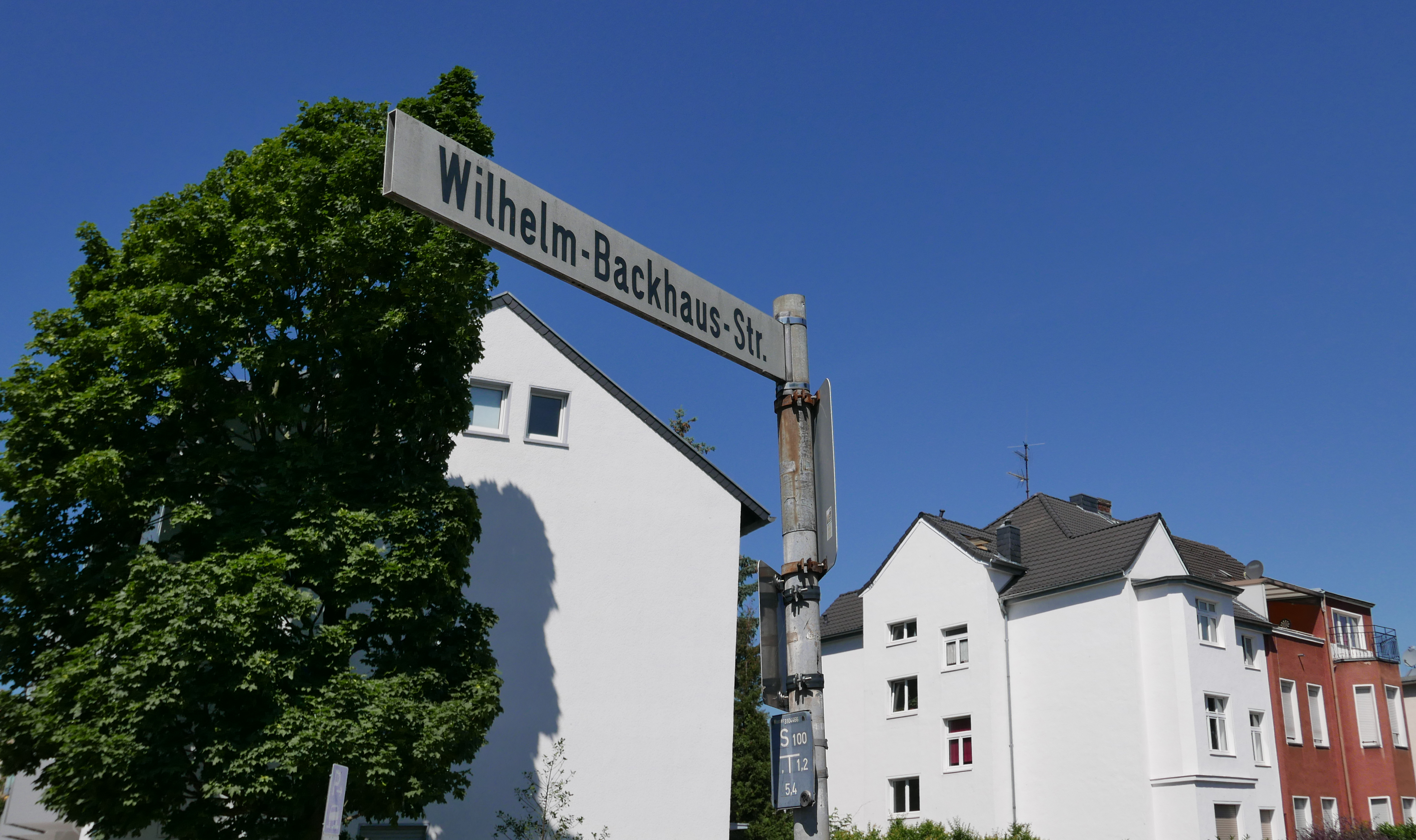 Wilhelm-Backhaus-Straße im Kölner Stadtteil Lindenthal